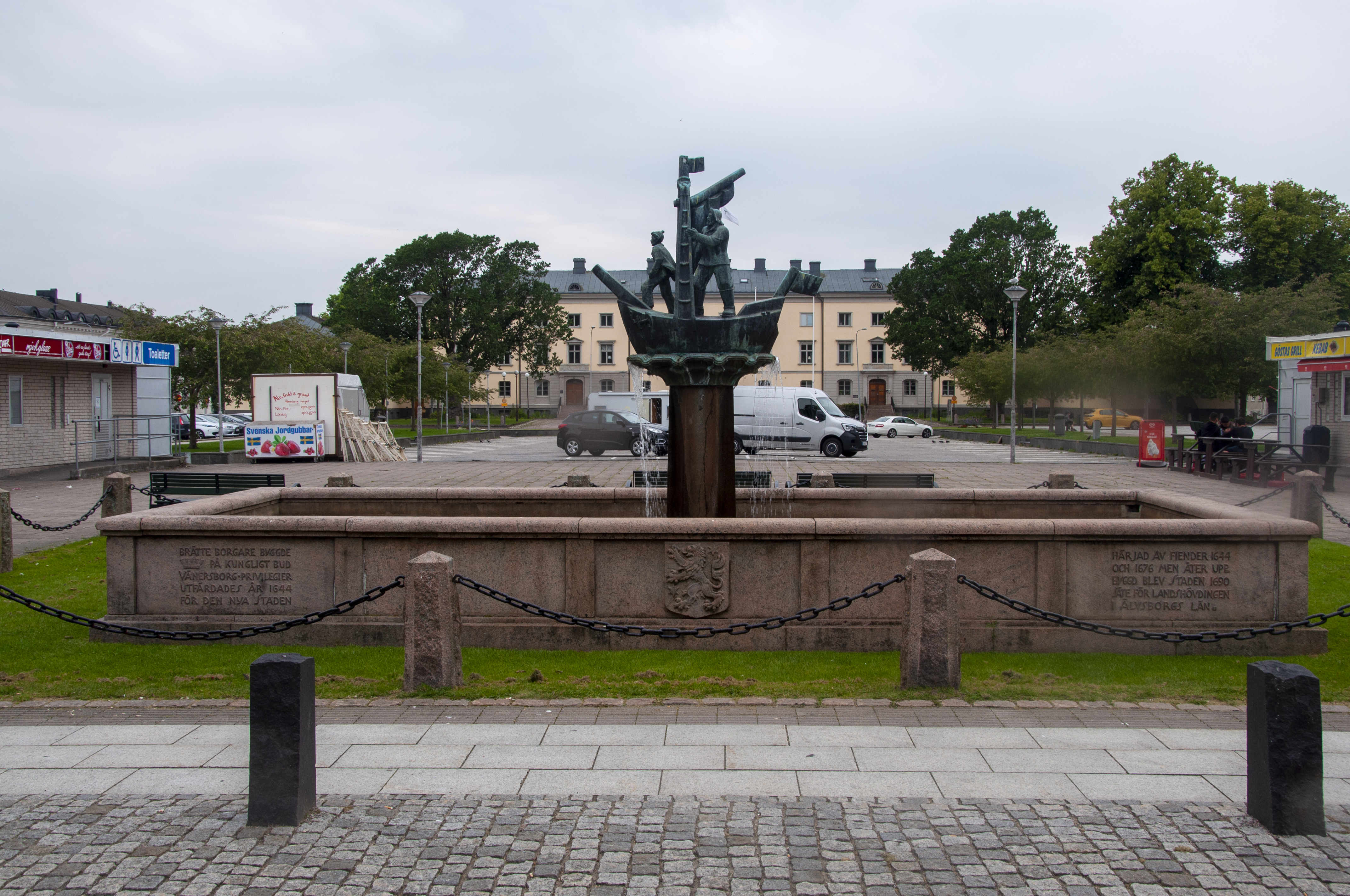 Torgbrunnen i Vänersborg, i brons och granit, av Carl Elmberg. Uppförd i samband med stadens 300-års-jubileum 1944.